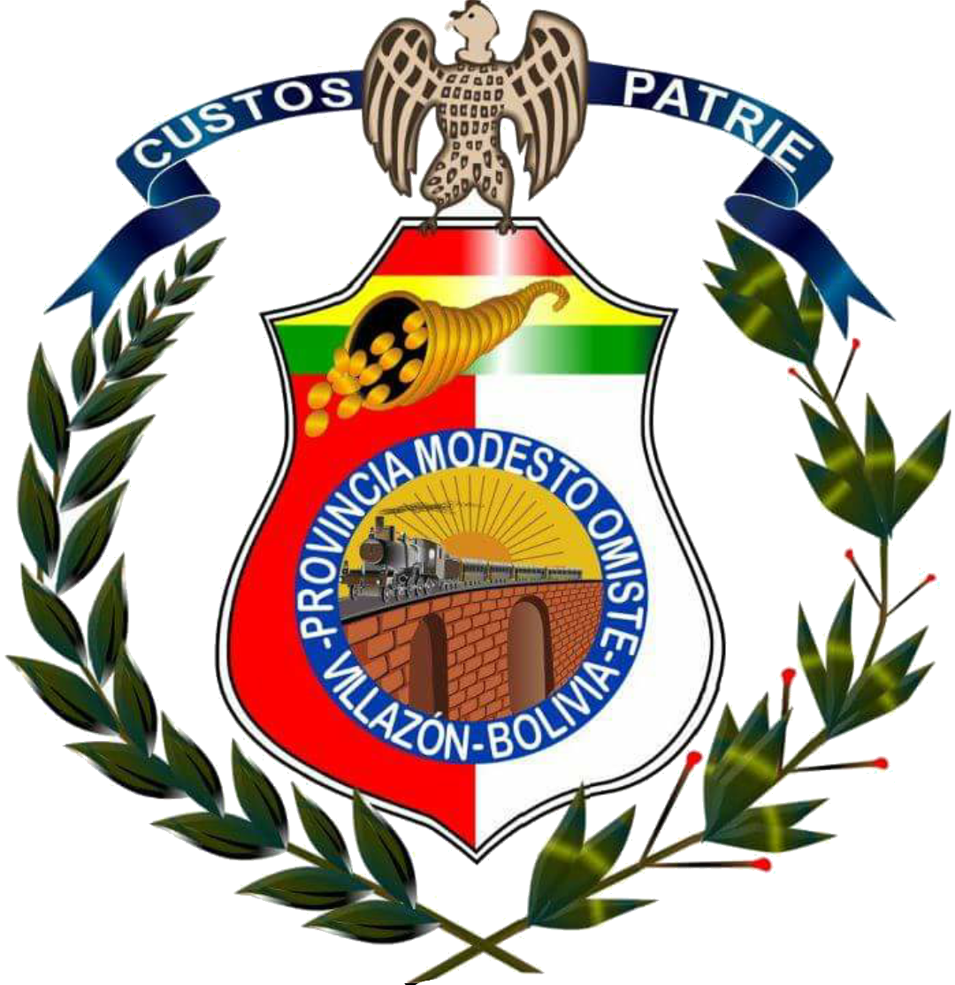 Escudo de la ciudad de Villazón.